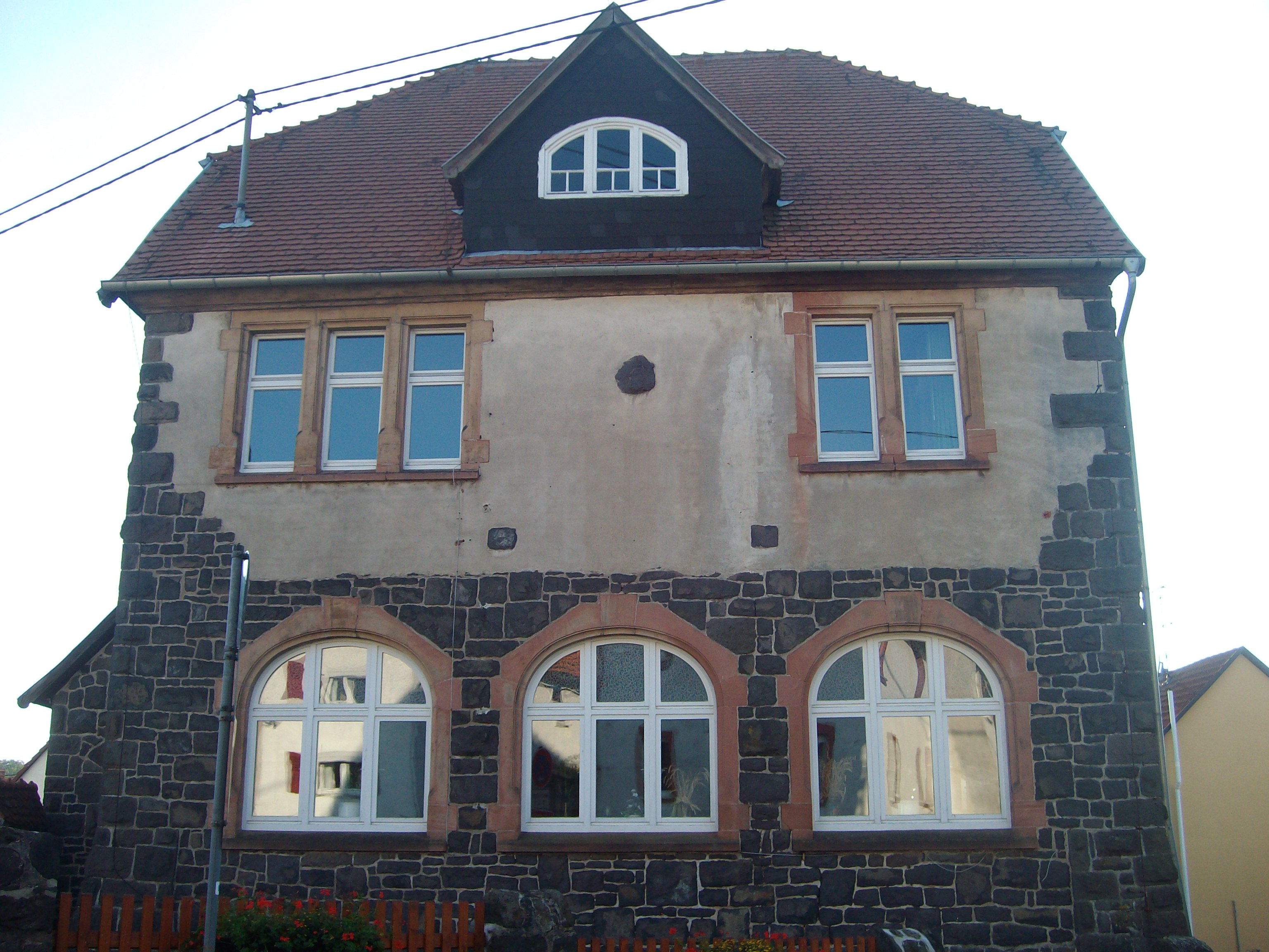 Ostseite der Evangelischen Kirche Altenhain, Laubach, Landkreis Gießen, Hessen, Deutschland